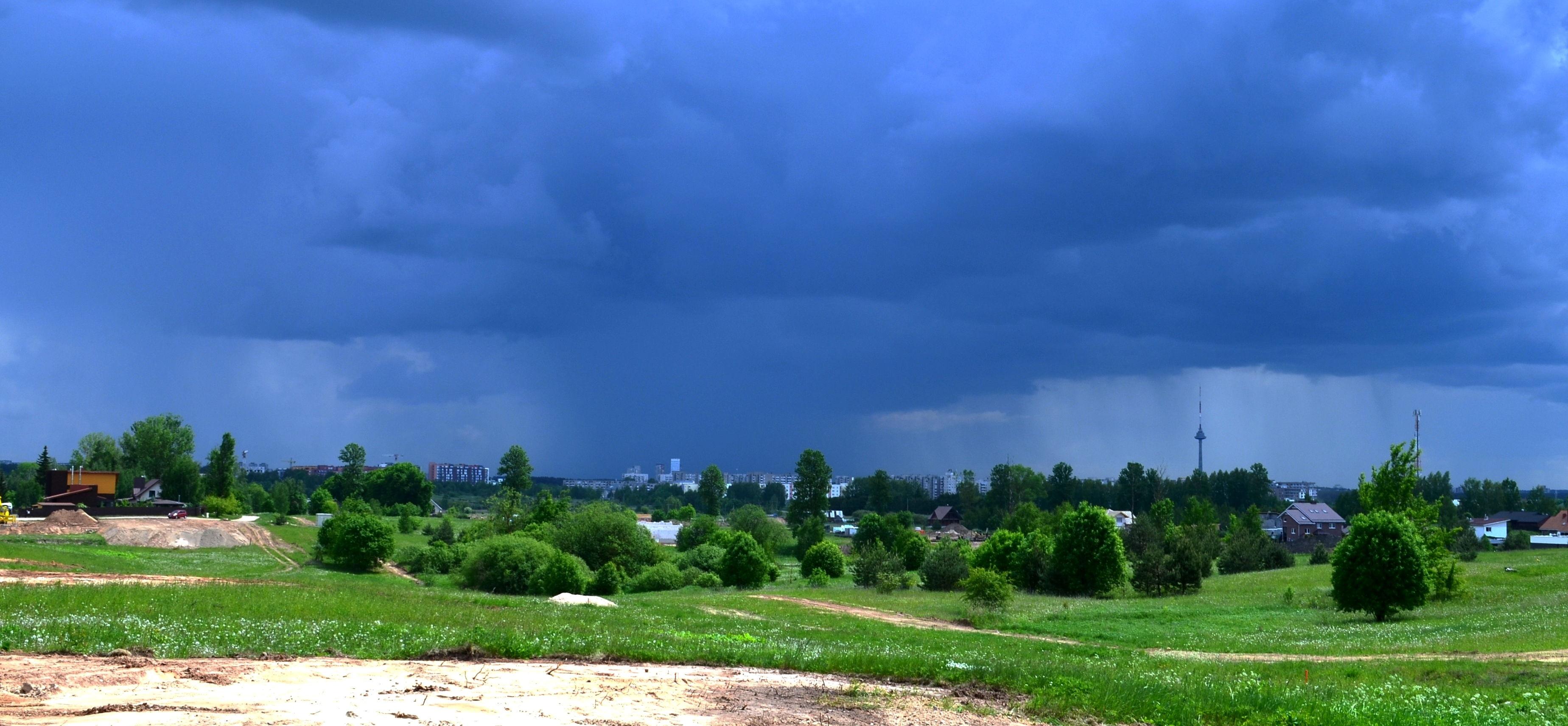 Padekaniškės, Pilaitės sen., Vilnius